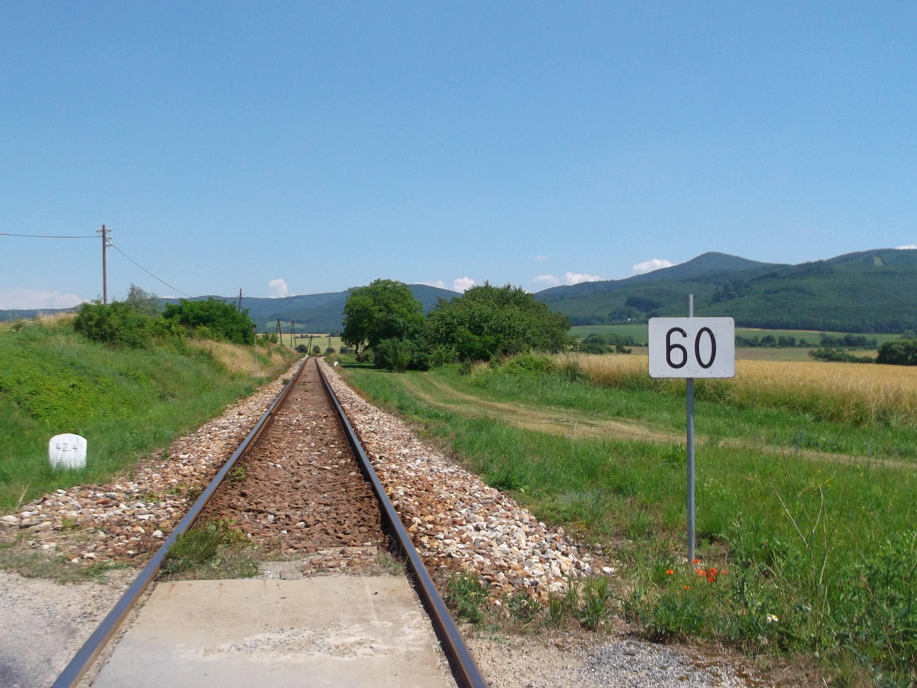 Soblahov